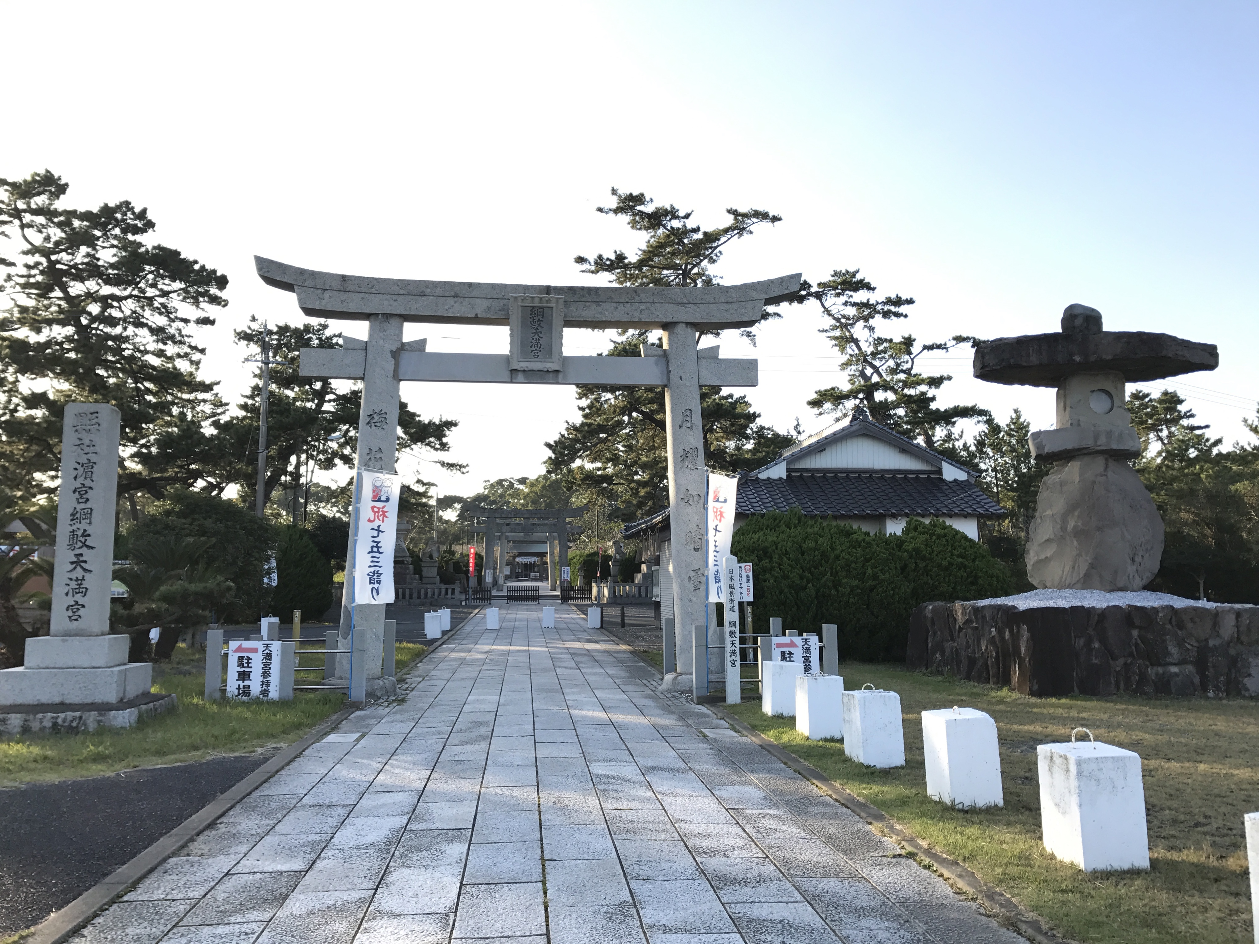 綱敷天満宮の鳥居と石灯籠